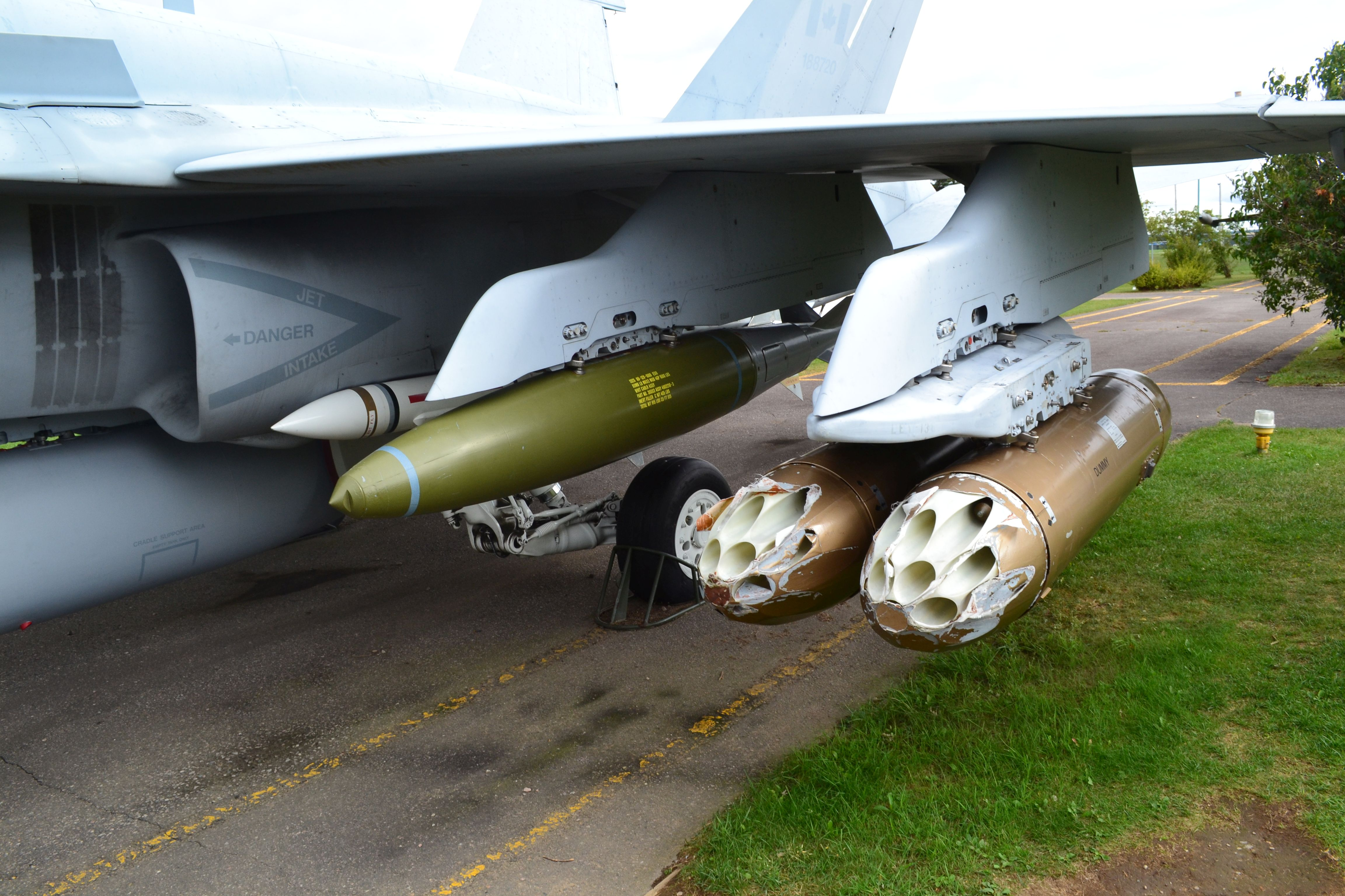 Armements du CF-18 Hornet